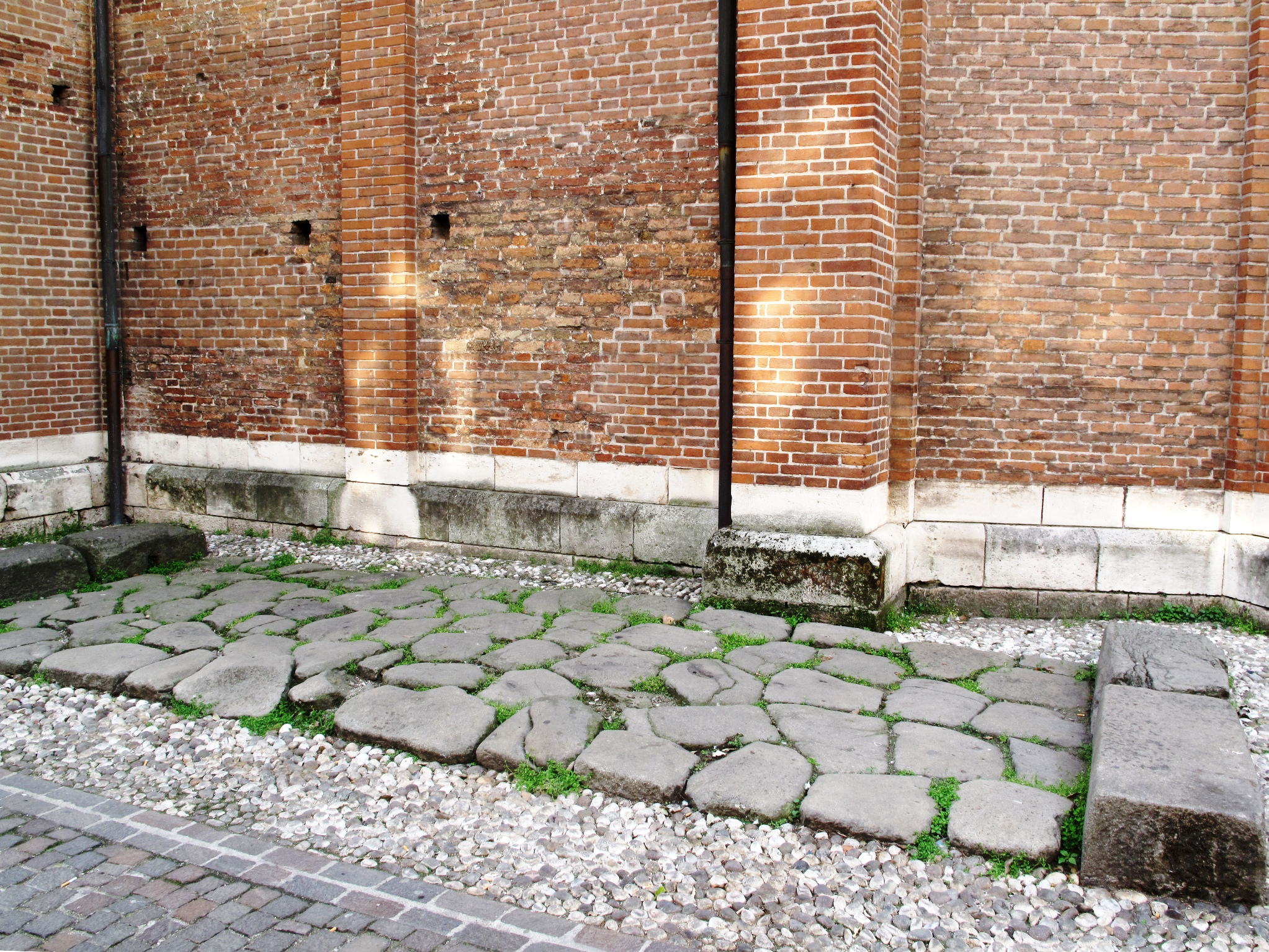 Reperto di strada romana nel centro storico di Vicenza, a fianco della Chiesa di San Lorenzo, lungo corso Fogazzaro